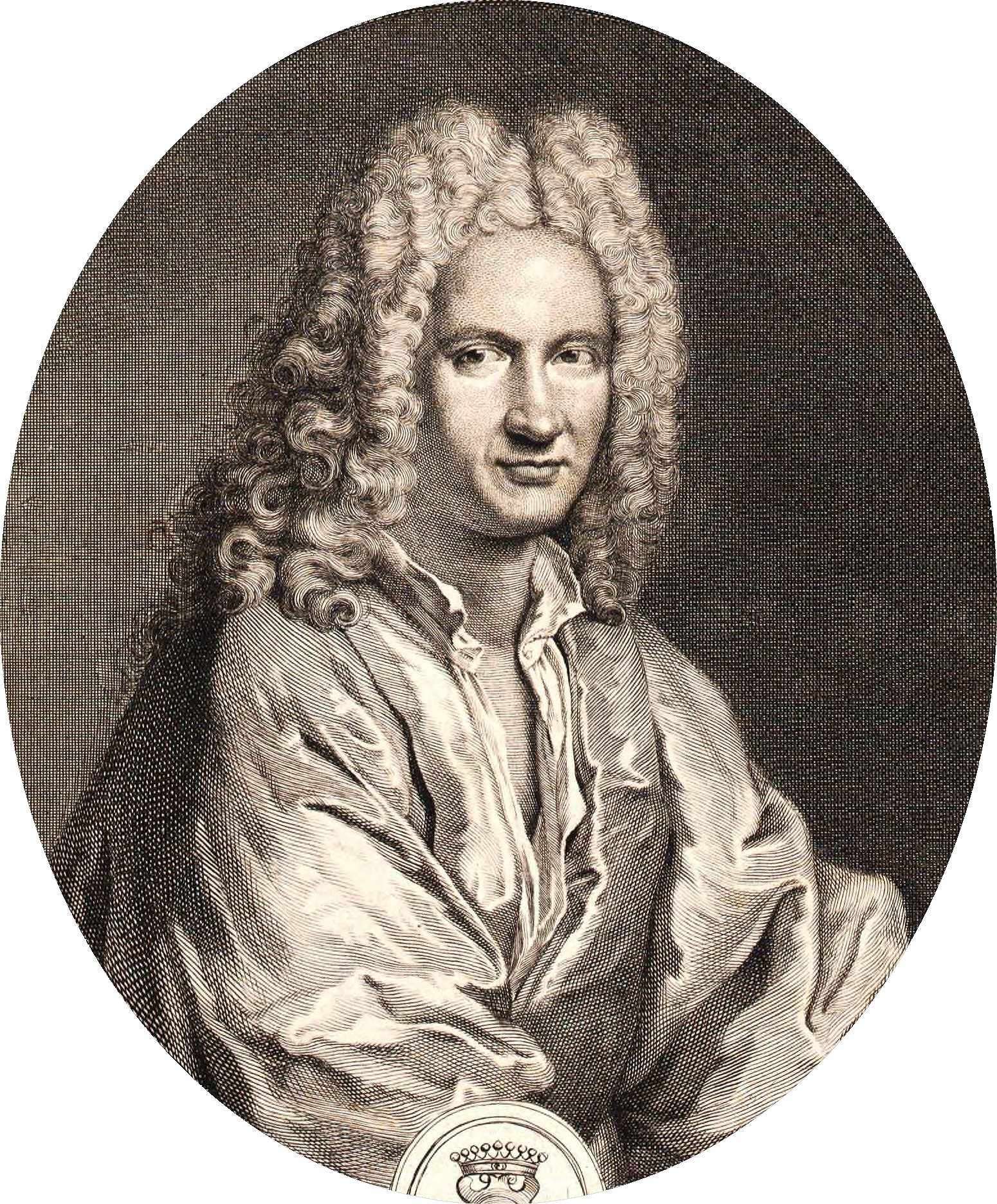 Estampe : eau-forte et burin ; 25 x 19 cm This file has been extracted from another file: André Campra.jpg